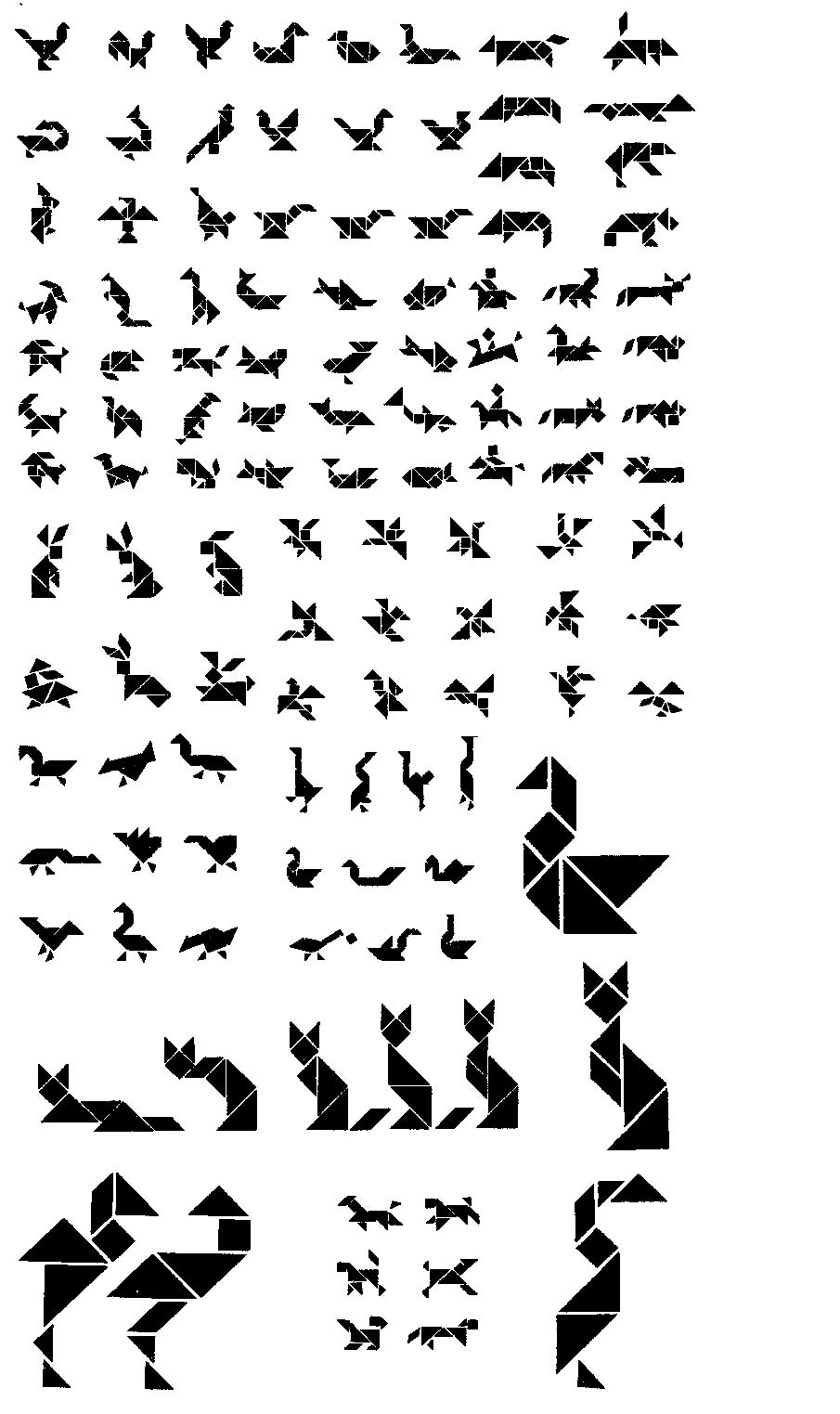 ট্যানগ্রাম দিয়ে তৈরি বিভিন্ন আকৃতি